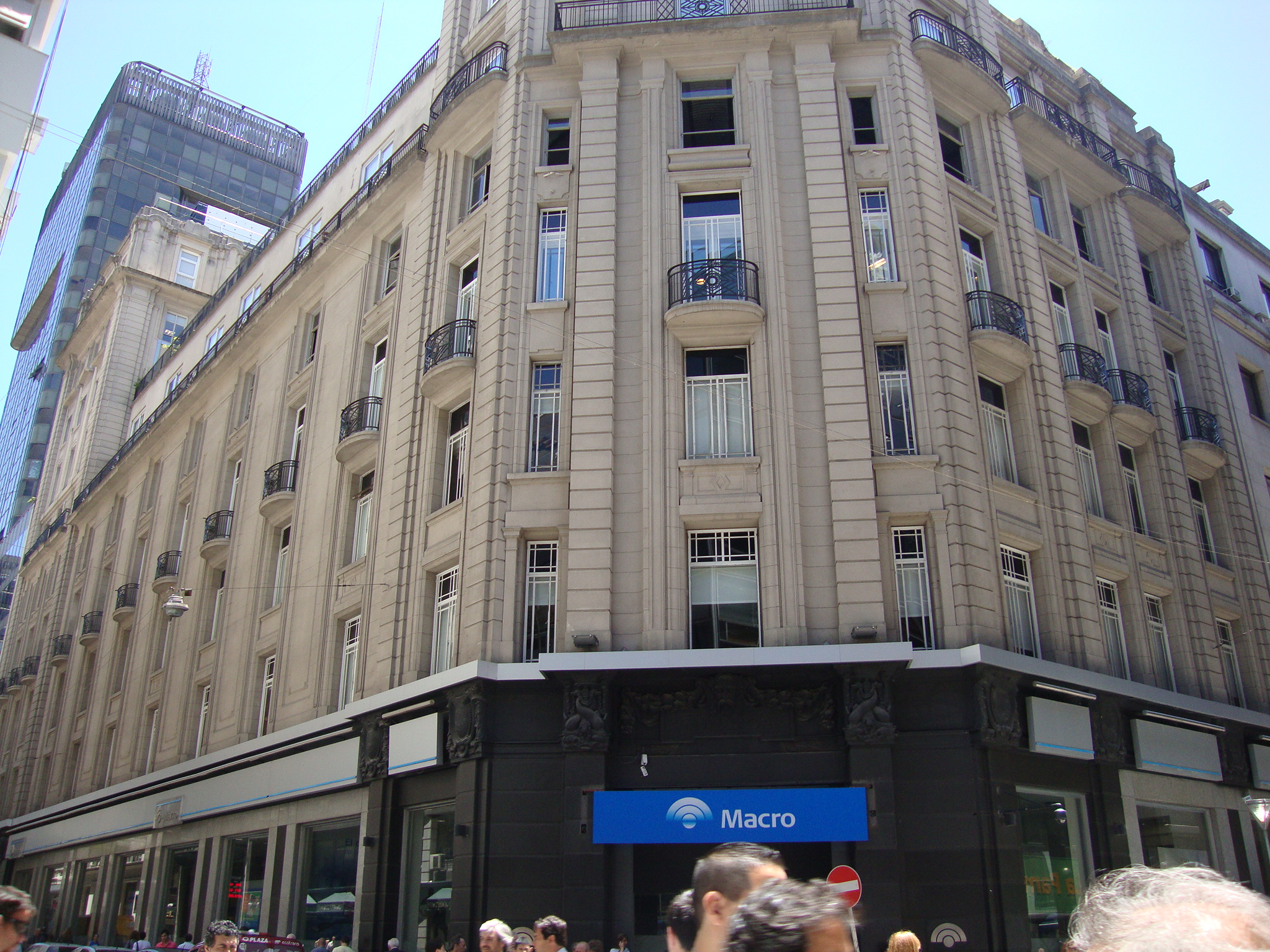 "Edificio Británico", hoy sede del Banco Macro. Vista parcial de la fachada. Sarmiento 401, esquina Reconquista. Buenos Aires, Argentina.